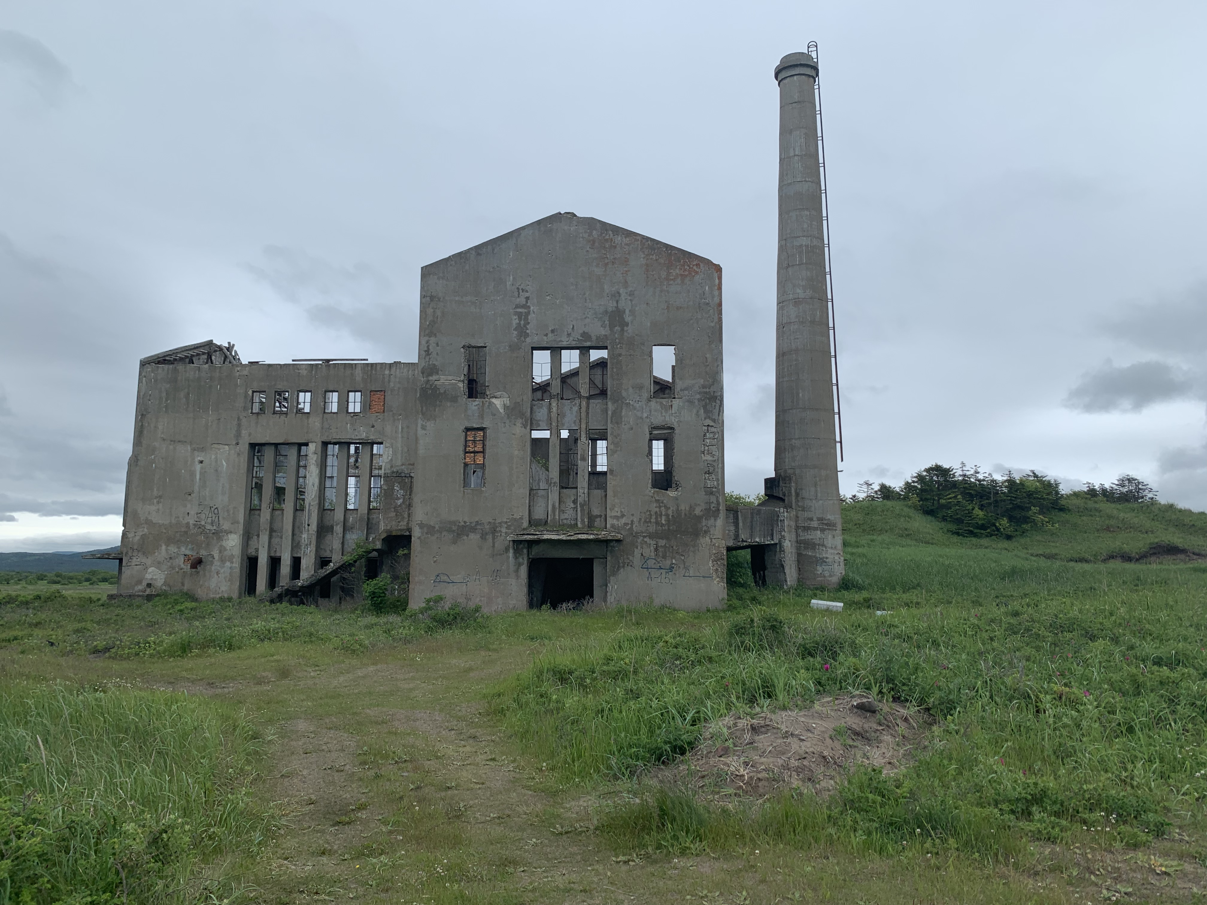 Сахалин Красногорск Электростанция